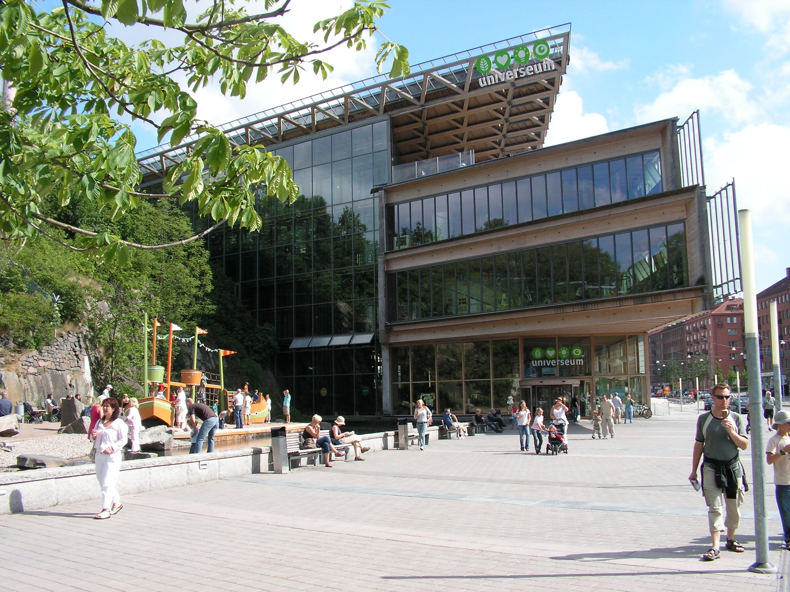 jag har tagit bilden för ändamålet Stefan Linder Stefan.lila 21 juli 2006 kl.15.02 (CEST)